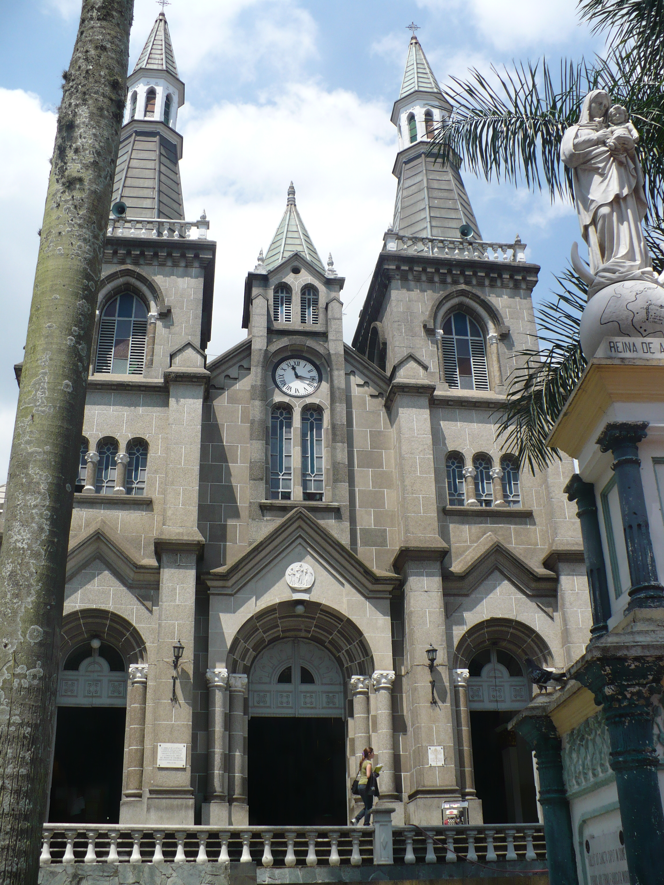 Fachada de la Basílica Menor de Nuestra Señora del Rosario de Chiquinquirá, en La Estrella.